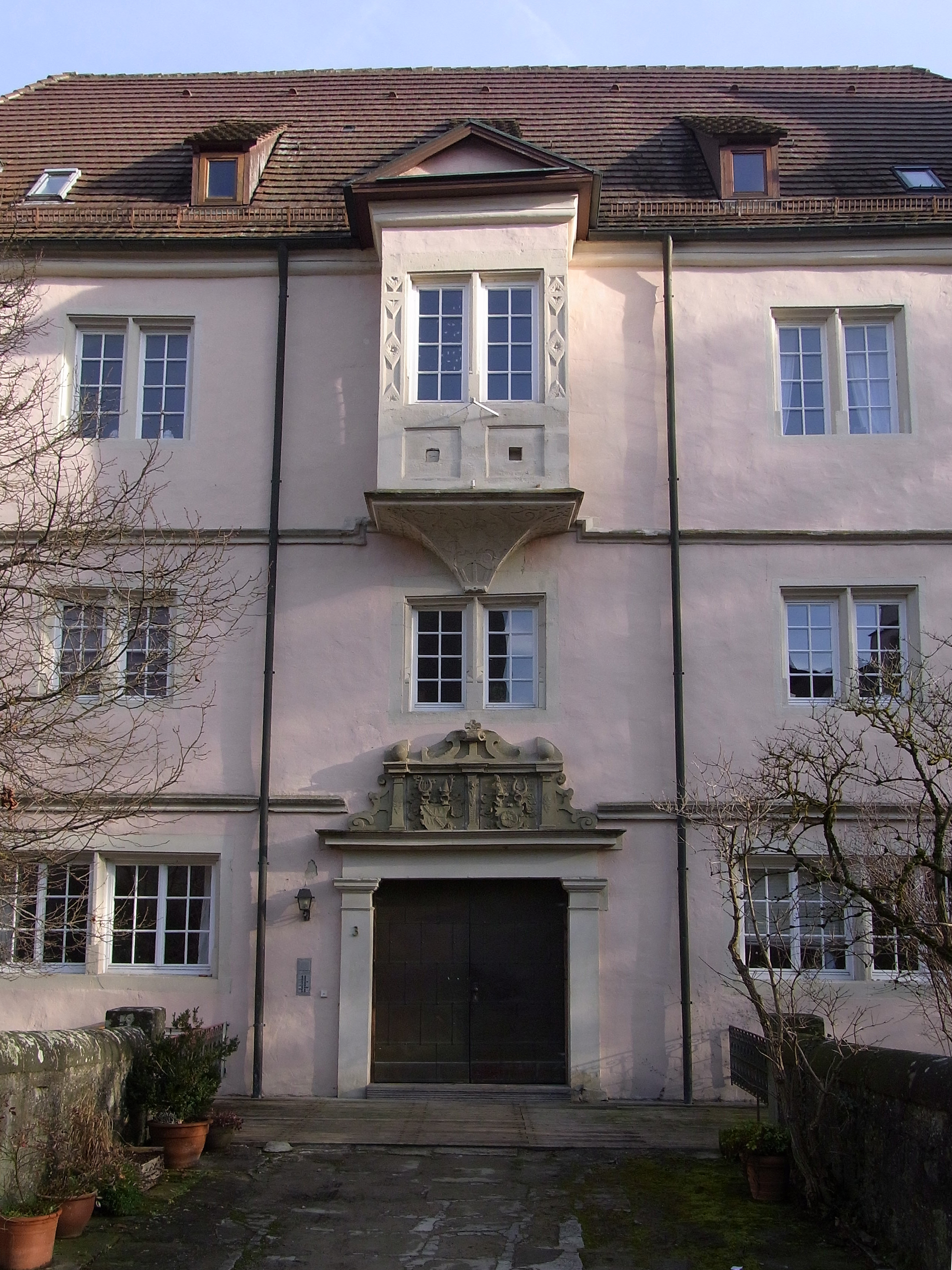 Ammerbuch-Poltringen: Schloss Poltringen